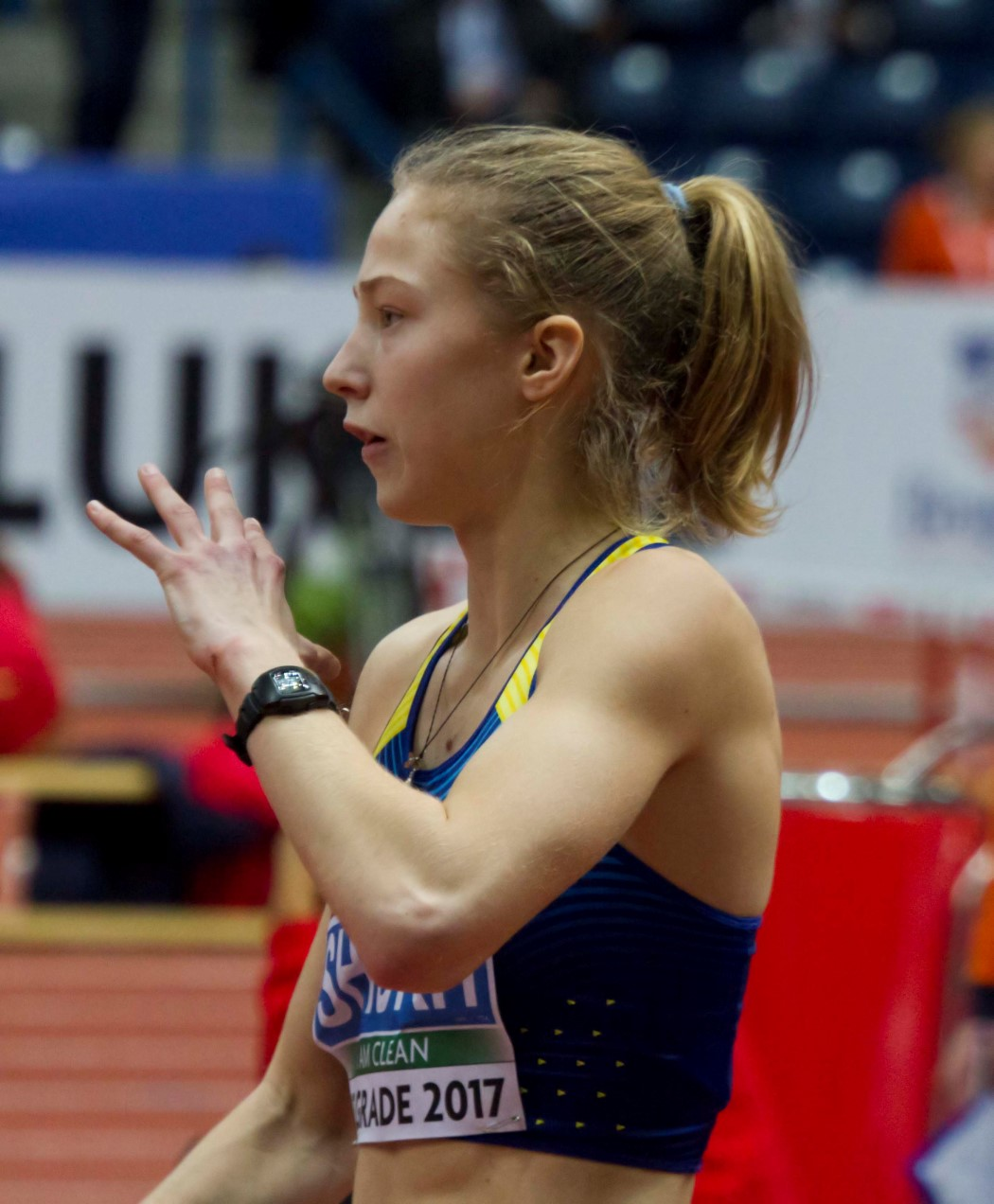 _150 pent hoog shukh